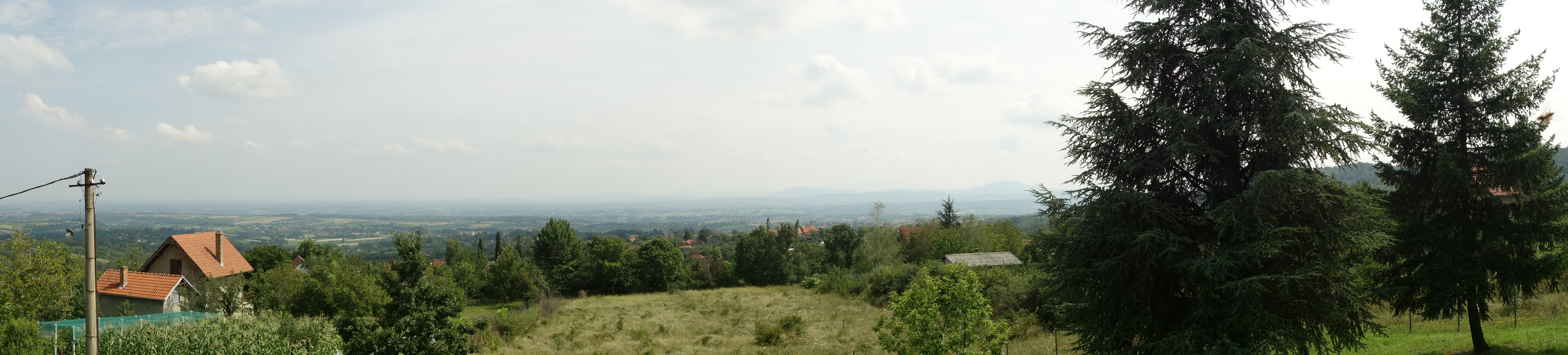 Српски (ћирилица): Ово је фотографија заштићеног природног добра у Србији под шифром: ПИО03 This is a a photo of a natural area in Serbia with ID: ПИО03